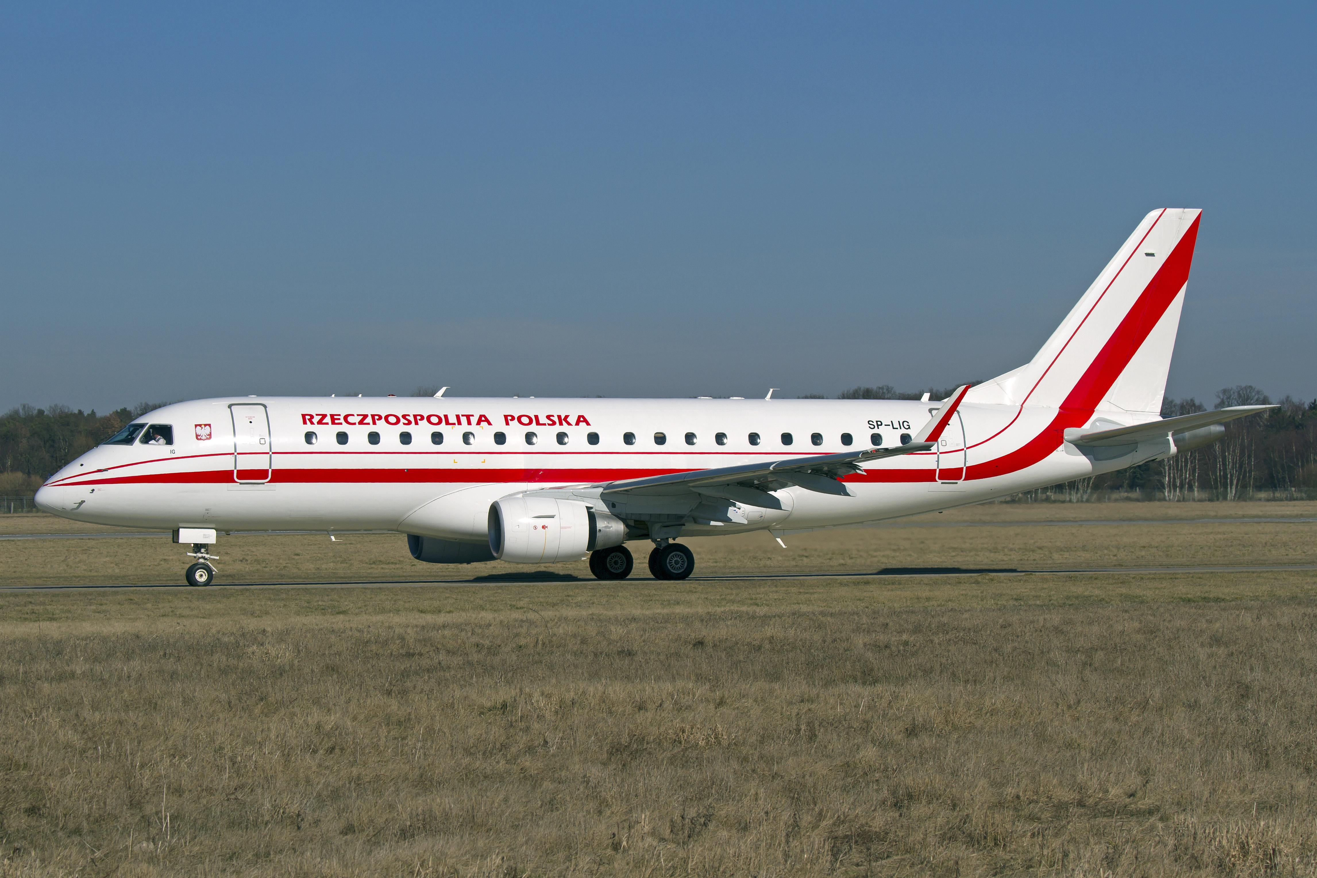 HAJ/EDDV 05-03-12